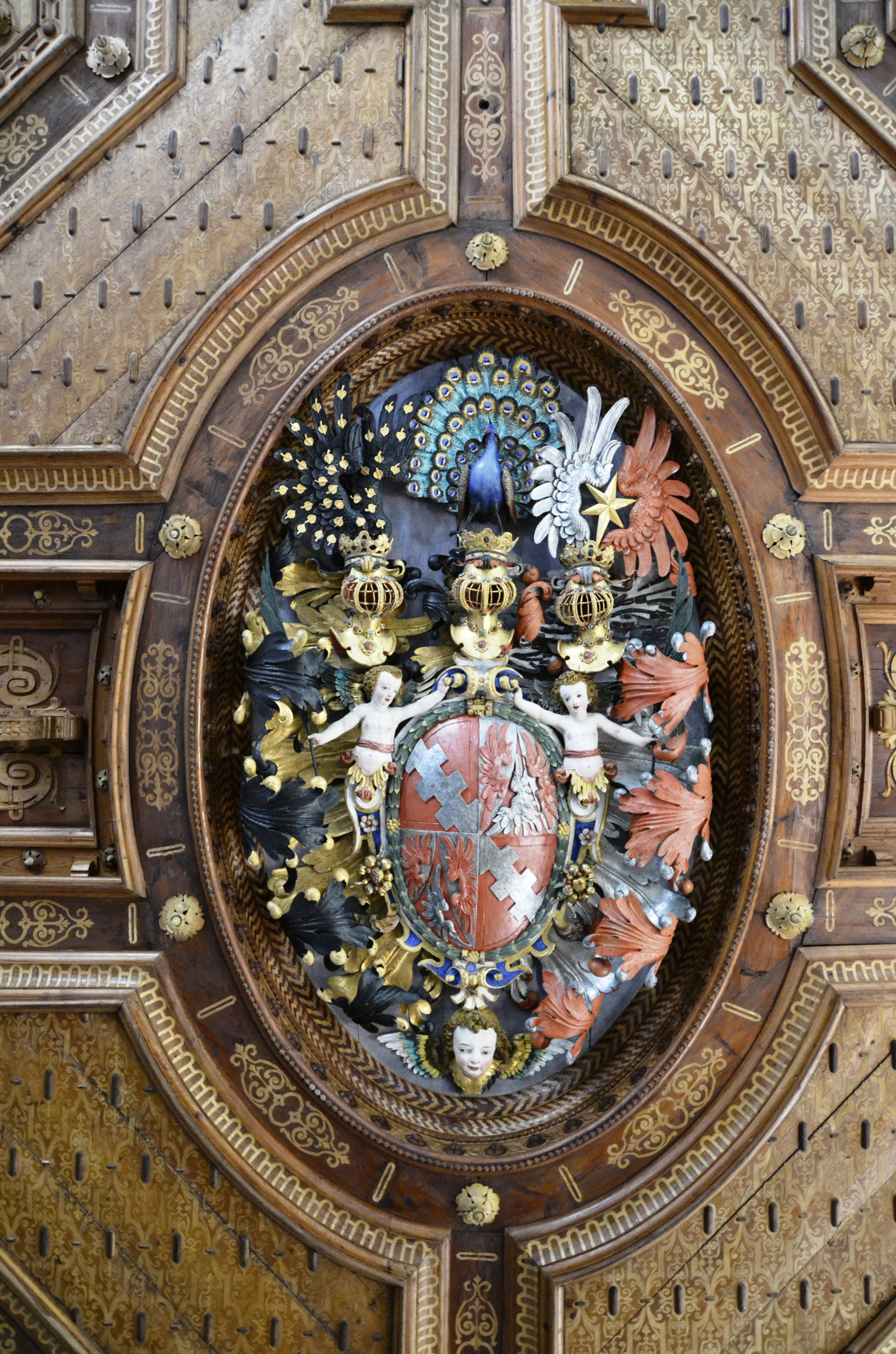 Die Renaissance-Holzdecke der Kapelle mit dem Ortenburger Wappen im Schloss Ortenburg.